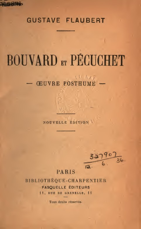 Bouvard et Pécuchet : oeuvre posthume / Gustave Flaubert. - Paris : Fasquelle, [1899]. - 400 p. ; 18 cm. frontespizio